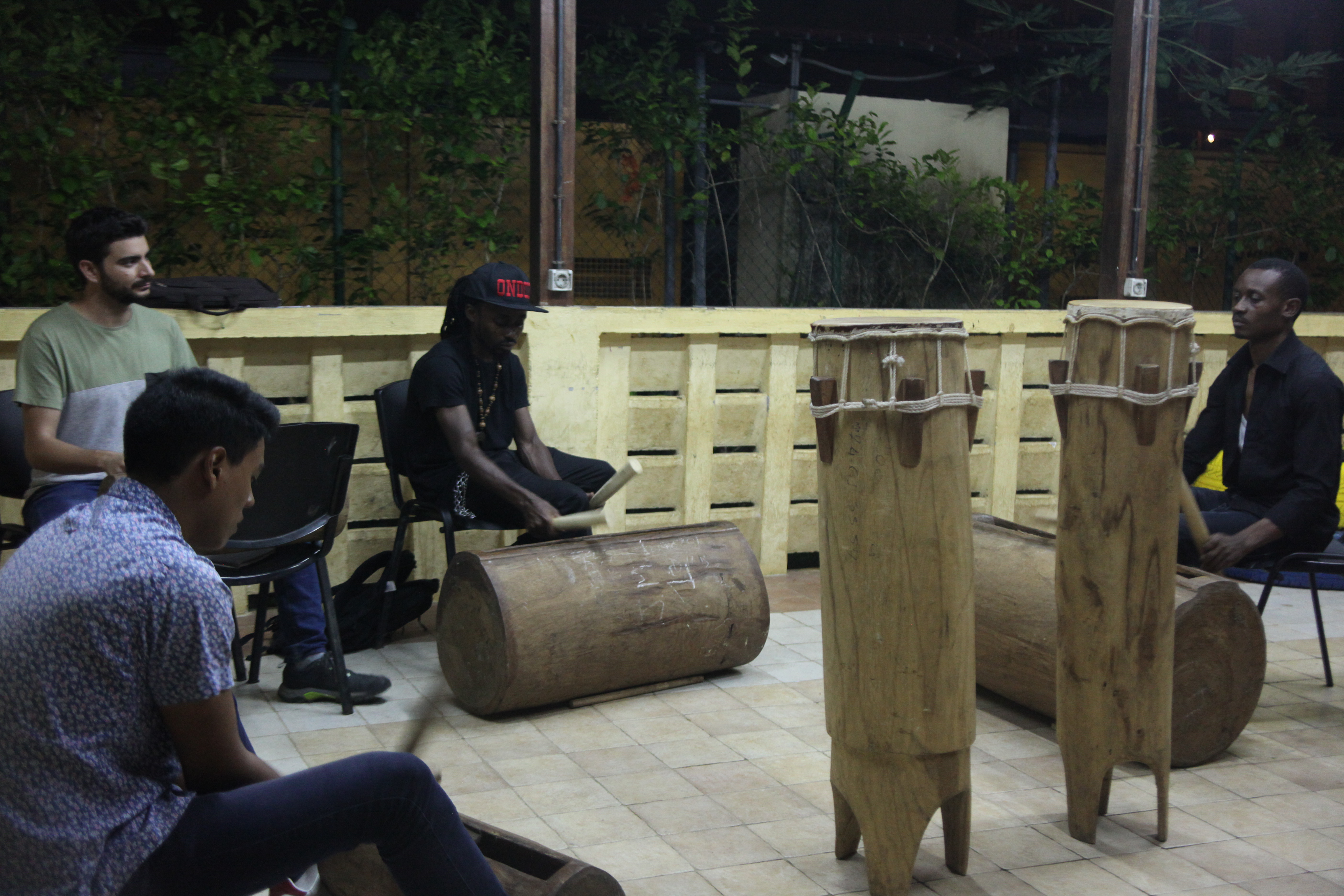 Taller de percusión tradicional de Guinea Ecuatorial en la Casa de la Palabra (Abahá) del Centro Cultural de España en Malabo, Guinea Ecuatorial. This is an image of "African people at work" from Equatorial Guinea